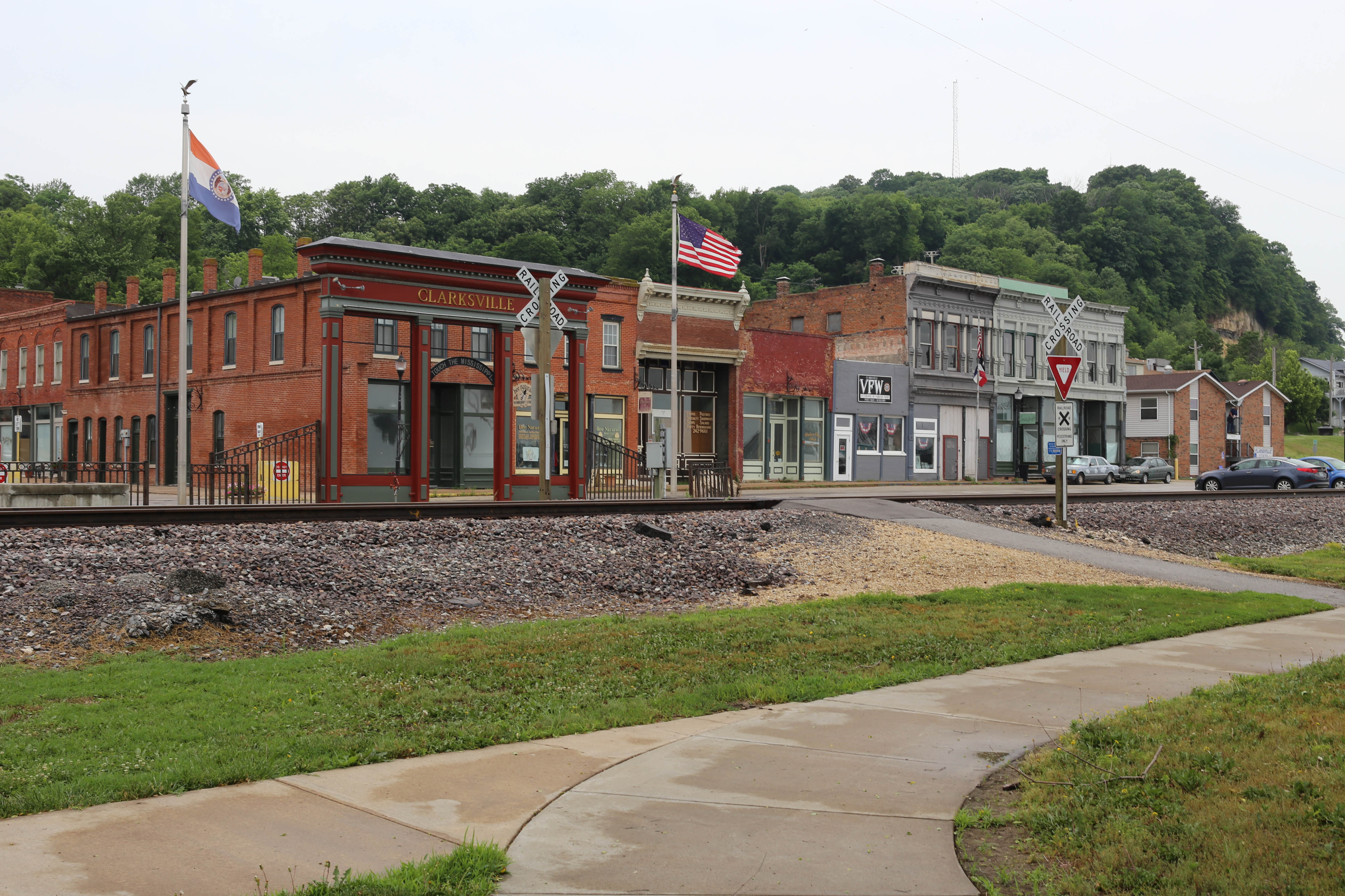 Clarksville, MO